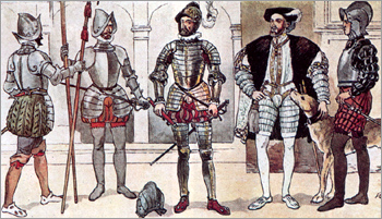 Clothing of Spain: spanish soldiers in 1540-1590s Одеяния воинов 1540-1590 гг.: 1. Капитан испанской армии. 2. Испанский солдат. 3. Парадное военное облачение. Ок. 1580 г. 4. Более ранняя «испанская» одежда (ок. 1530 г.). Император Карл V (1500 — 1558). 5. Знатный испанец. 1550 г.